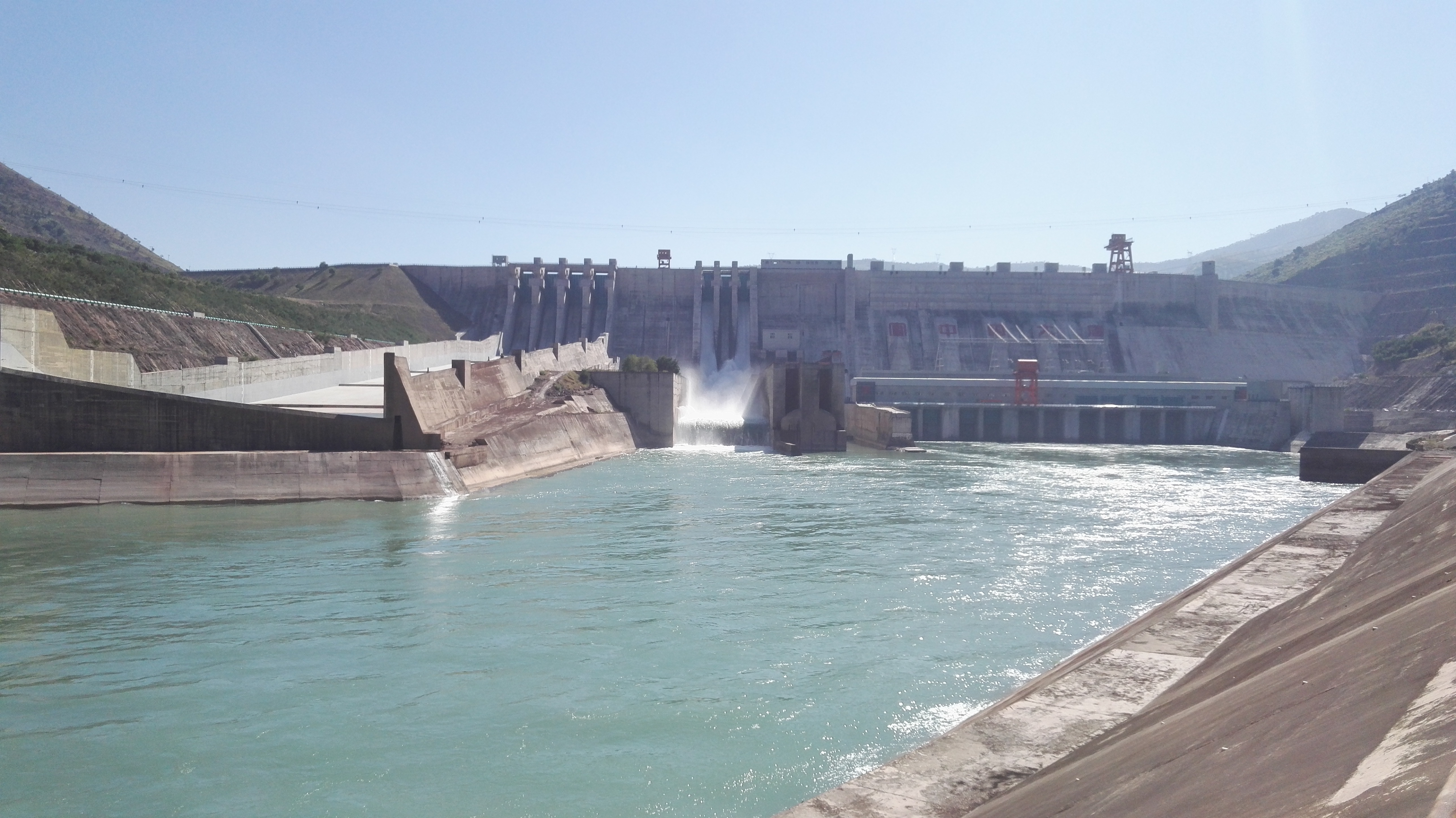 观音岩水电站坝下。可以看到大坝由混凝土坝和堆石坝组合而成。发电厂房位于坝下的河道内。